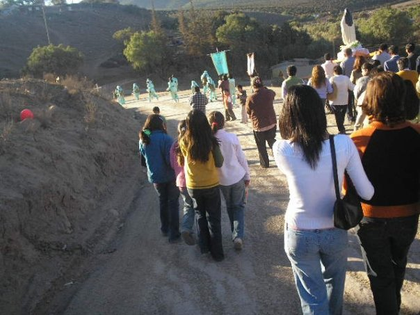 Procesión de Lagunillas, Ovalle, Fiesta religiosa